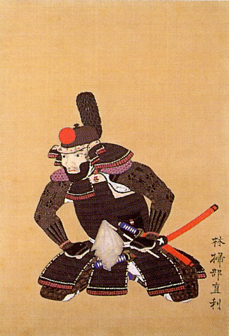 林直利の肖像。